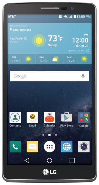 LG전자, ‘G비스타2’로 美 시장 공략 ■美이동통신사 AT&T 통해 6일 출시 ■ 14년 ‘G비스타’, 15년 ‘G4스타일러스’ 이어 美보급형시장 공략 박차 □ 5.7인치 풀HD 대화면, 스타일러스펜 등 두루 갖춰 ※ Social LG전자 ( 에서 관련 보도자료를 확인하실 수 있습니다.